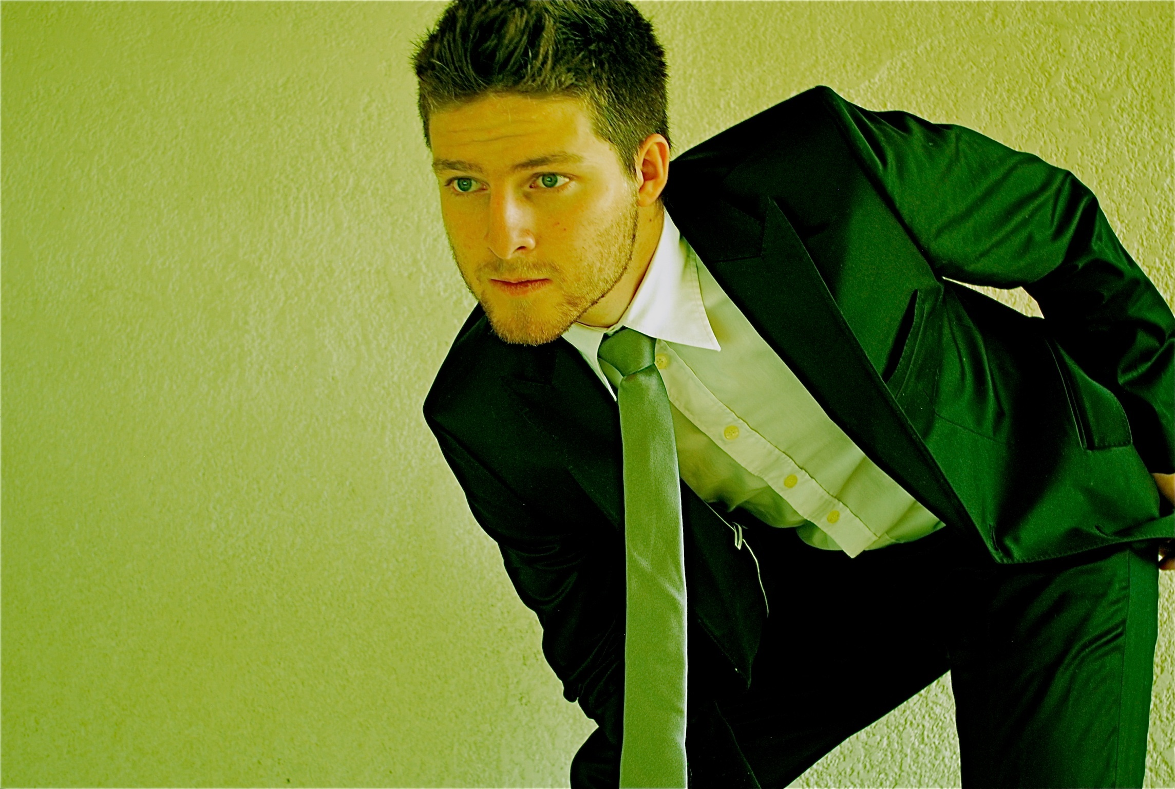 Actor